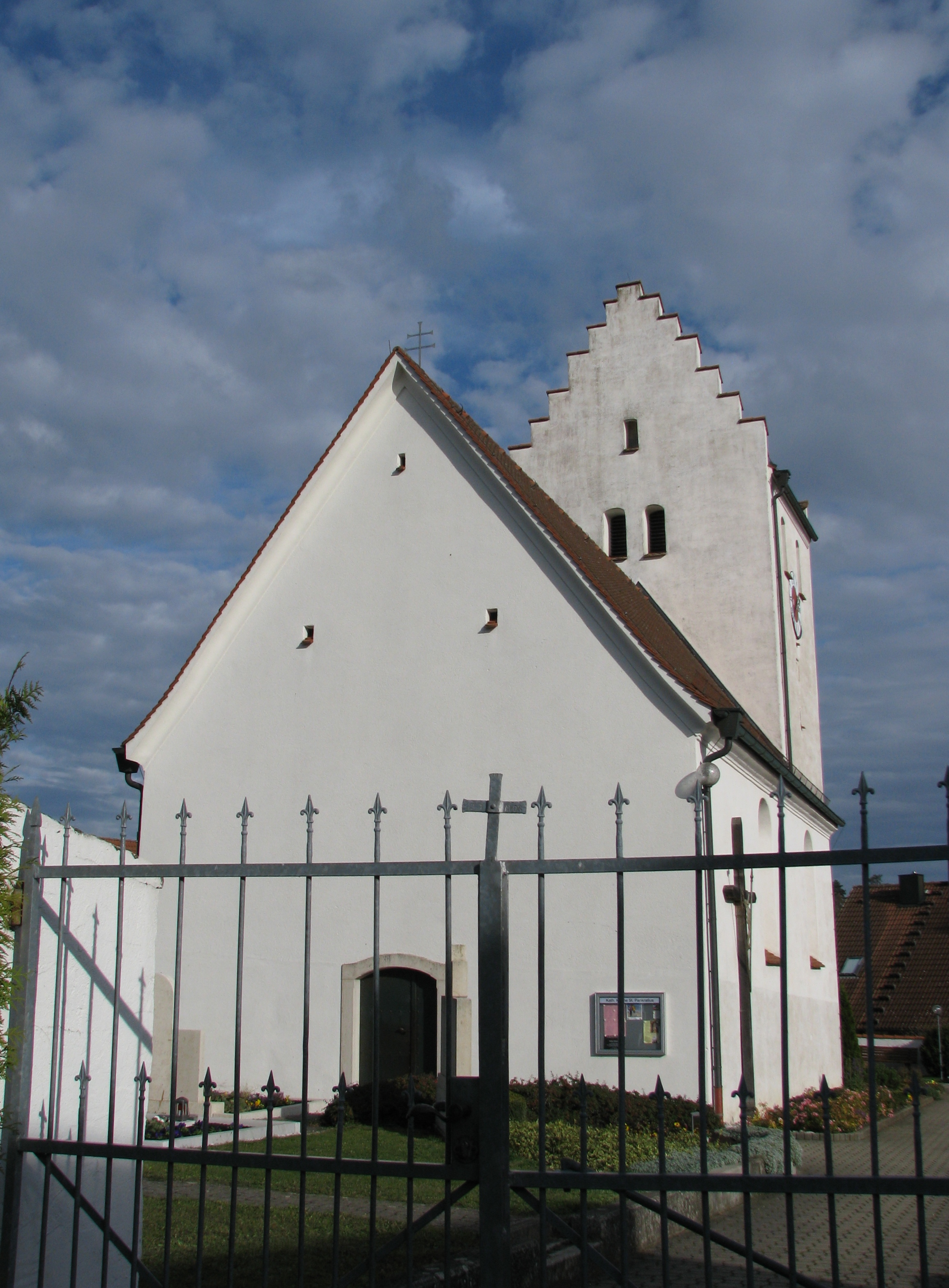 Herrnsberg, Ortsteil von Greding im mittelfränkischen Landkreis Roth in Bayern